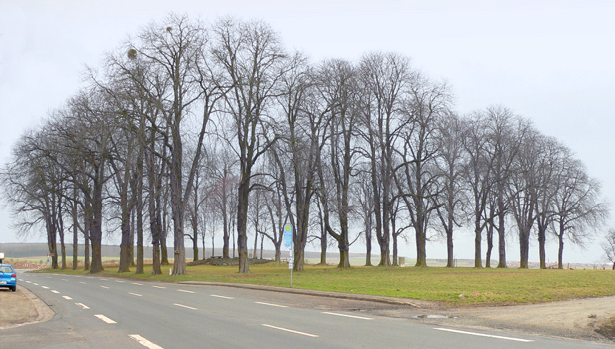 Thingplatz in Räbke